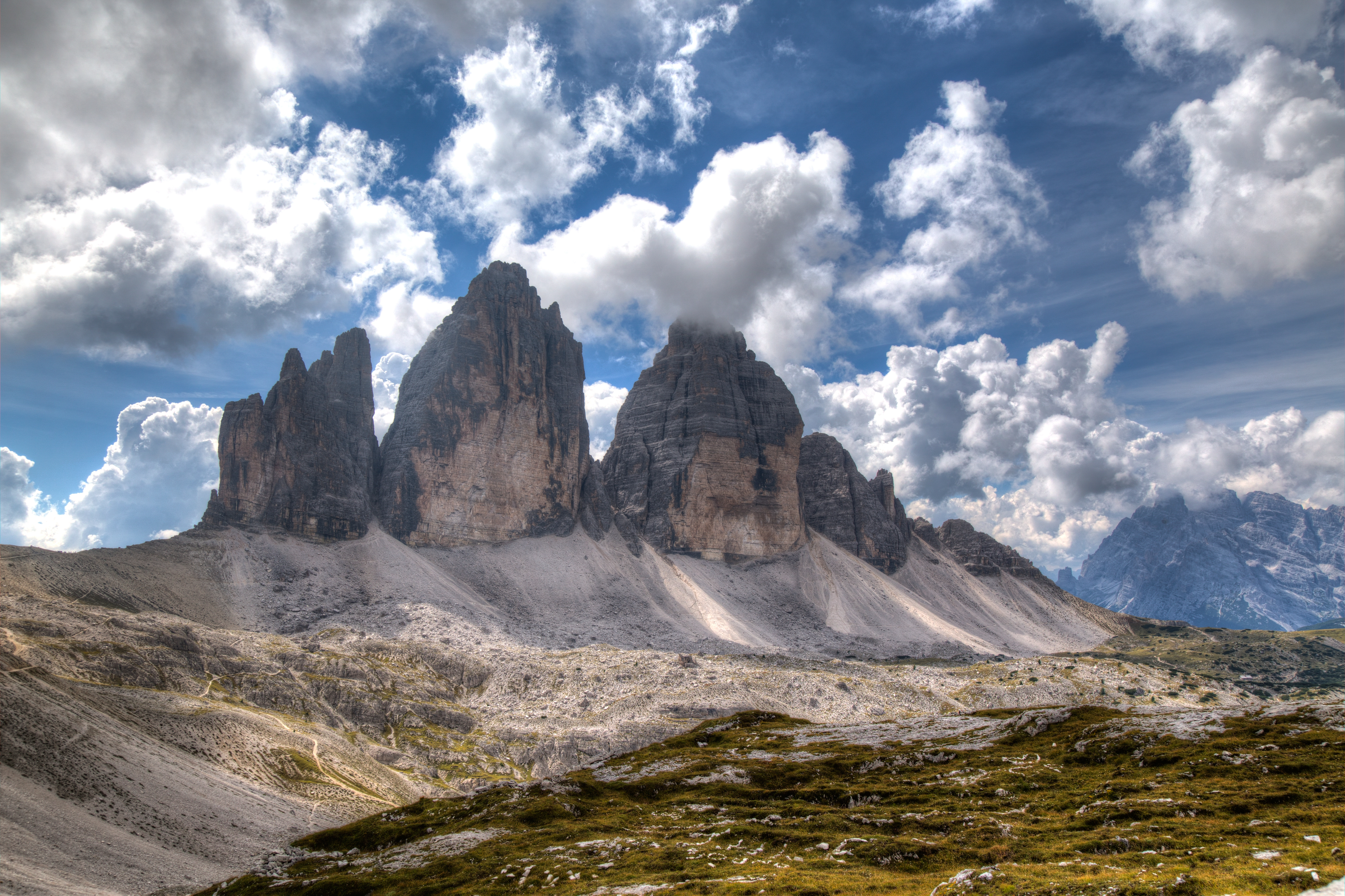 Parco naturale Tre Cime (Q1970453)